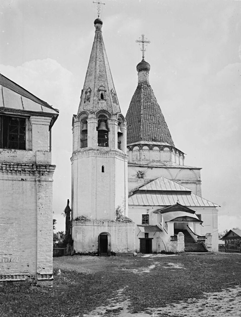 Общий вид Никольской церкви. 1894 г. г. Балахна, Нижегородская губерния